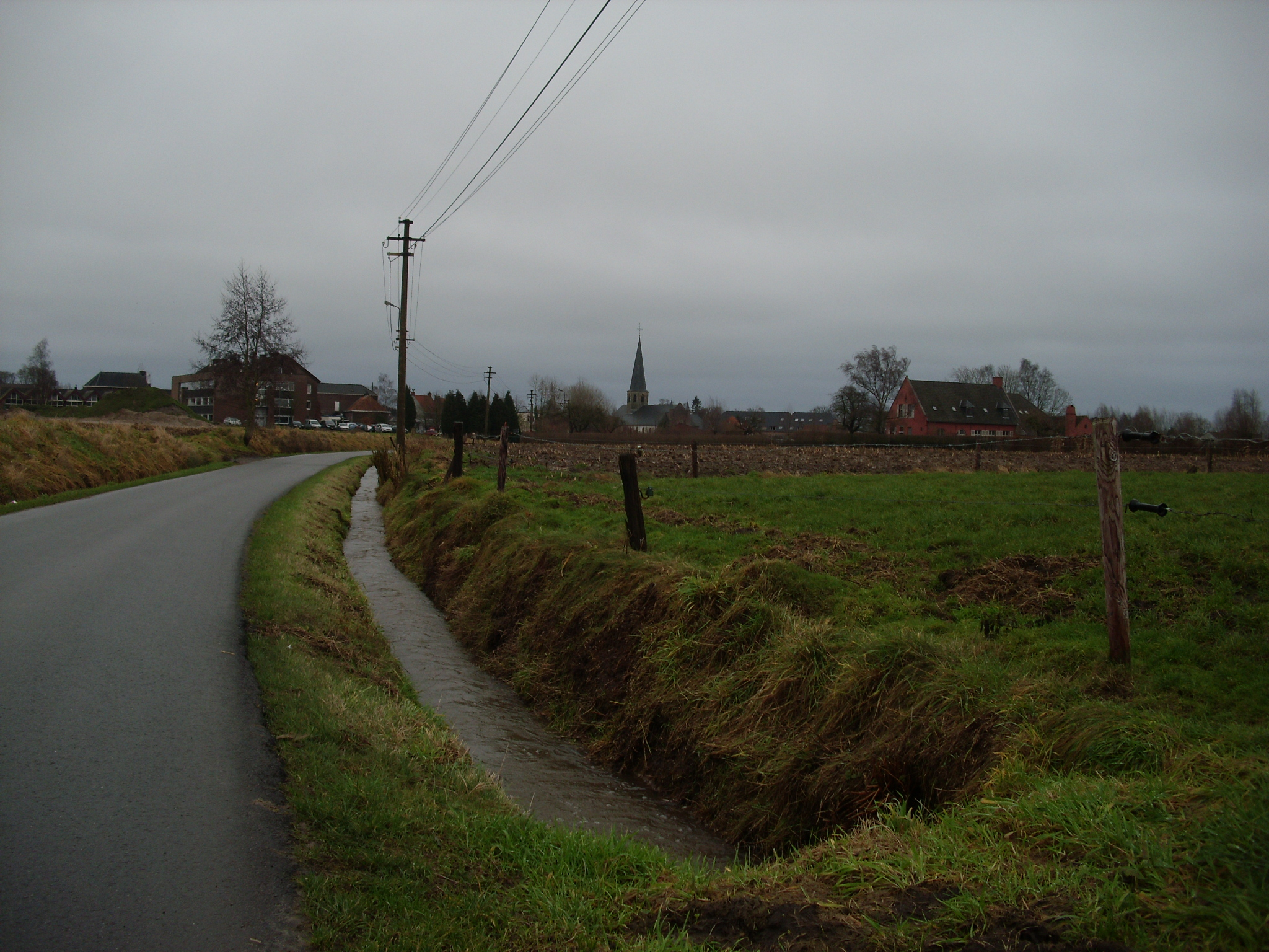 De Leensvoorbeek in Ursel - Knesselare - Oost-Vlaanderen - Vlaanderen - België